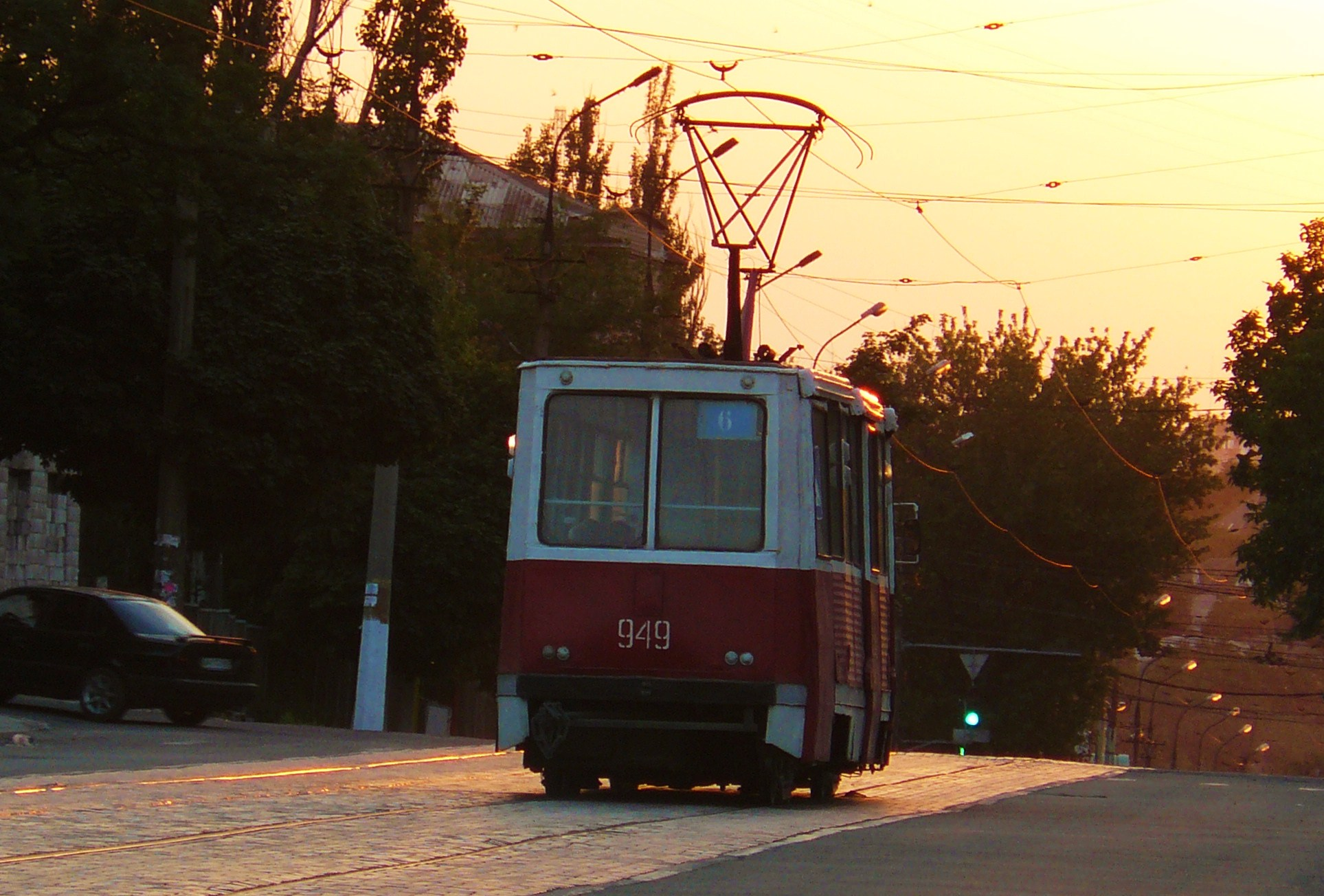 Trams in Mariupol, juni 2012.